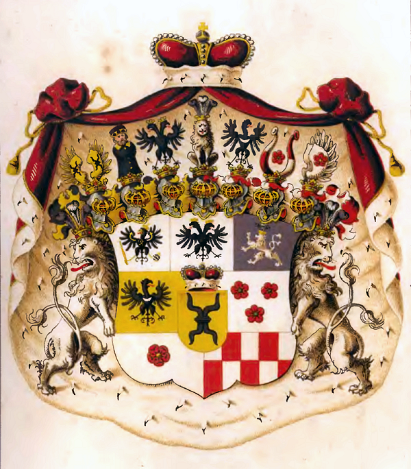 Wappen der Fürsten von Hatzfeld zu Trachenberg